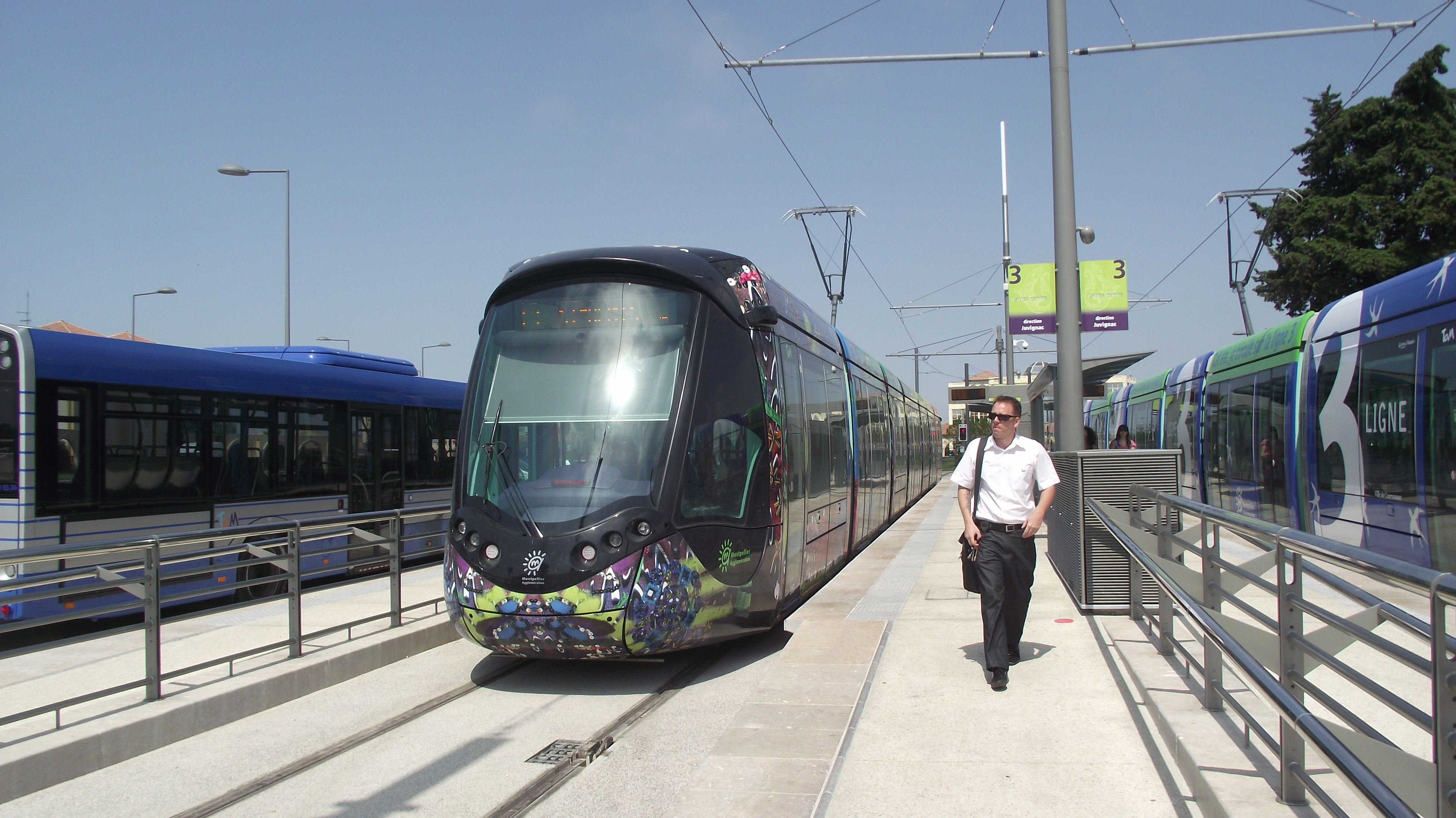 Tramlijn 3 in bij het eindpunt in Lattes (Hérault, Frankrijk).